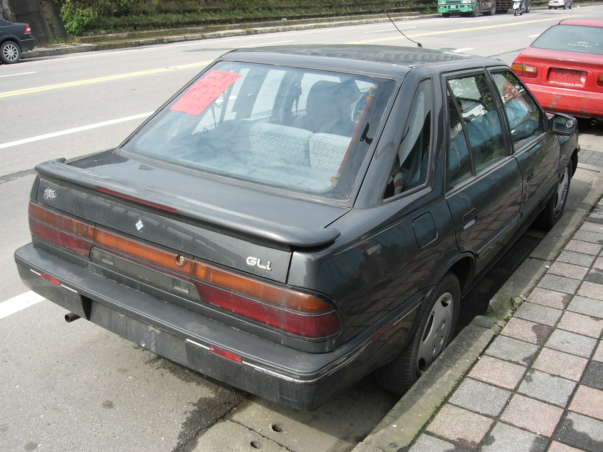 1994年裕隆精兵GLi 1800c.c.手排轎車右後方外觀